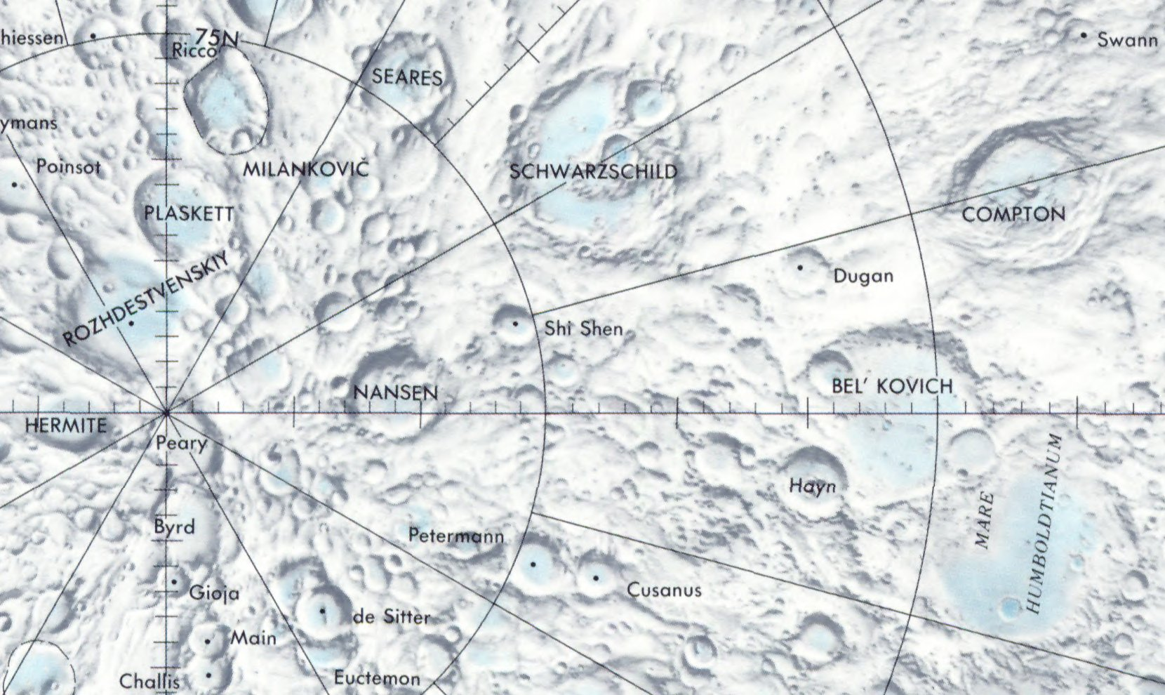 Cráter lunar Shi Shen. Localización. (Lunar Chart LPC1. Second Edition)